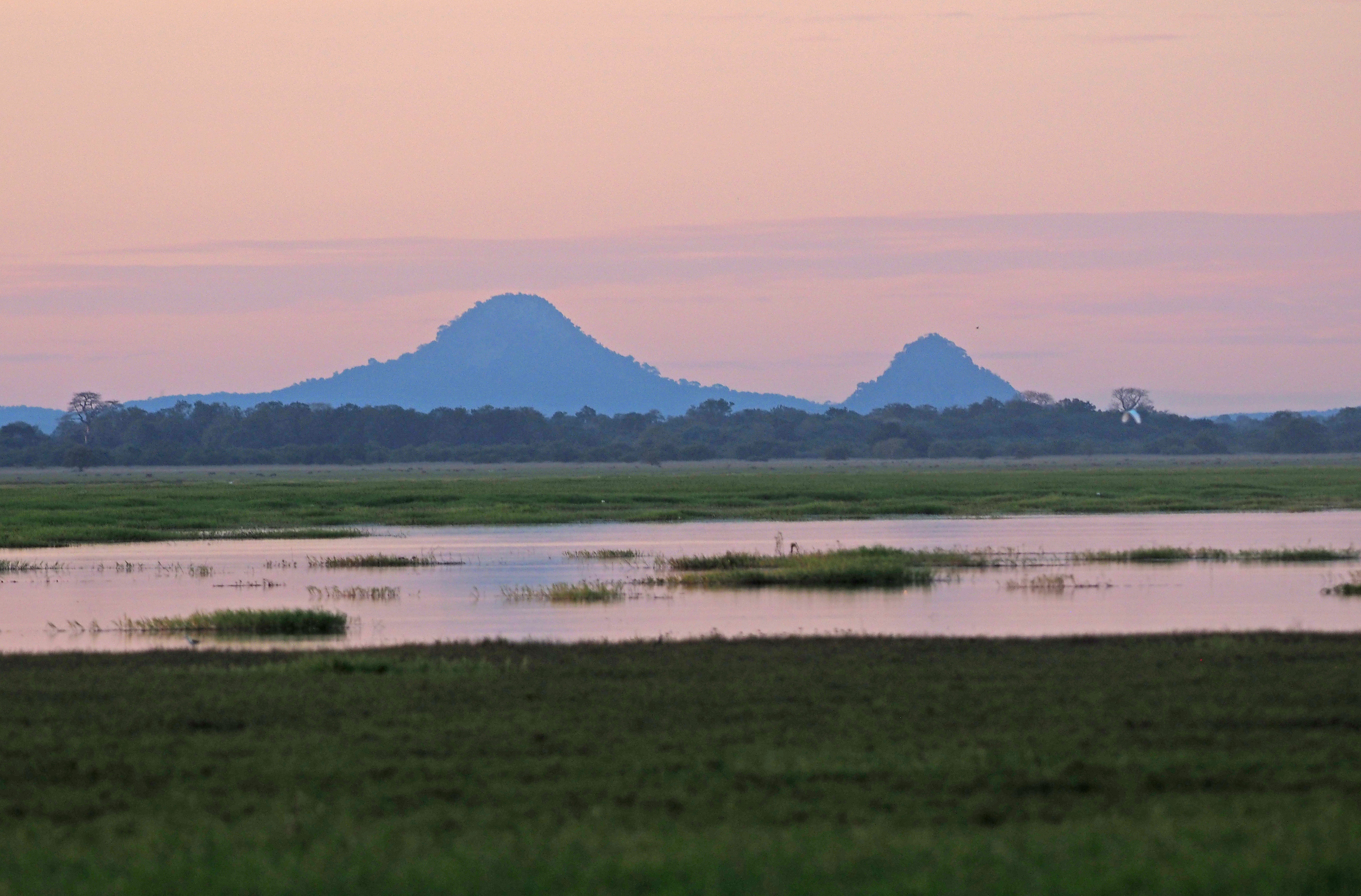 Mount Gorongosa, Gorongosa National Park, Mozambique